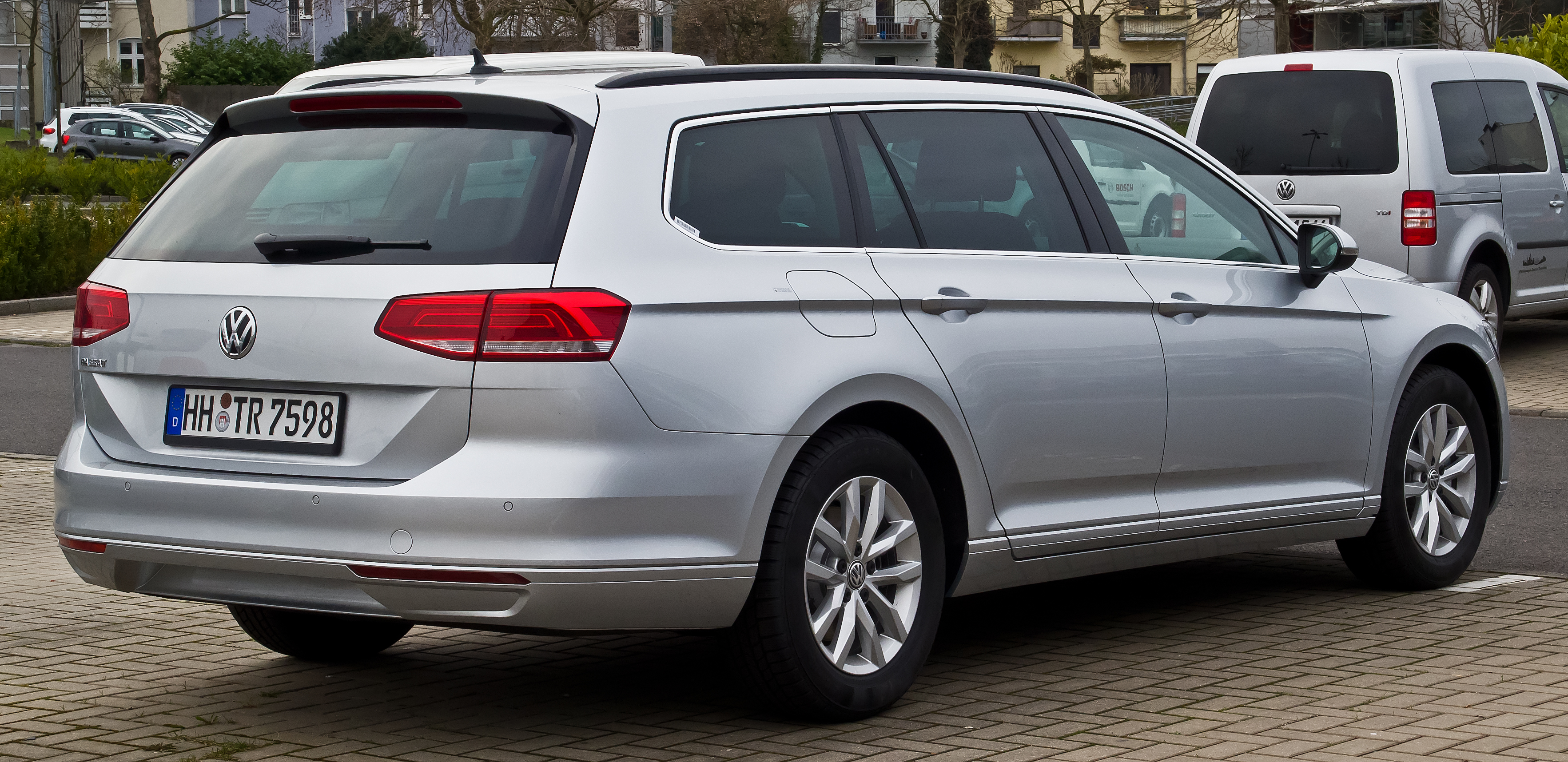 VW Passat Variant Comfortline (B8)